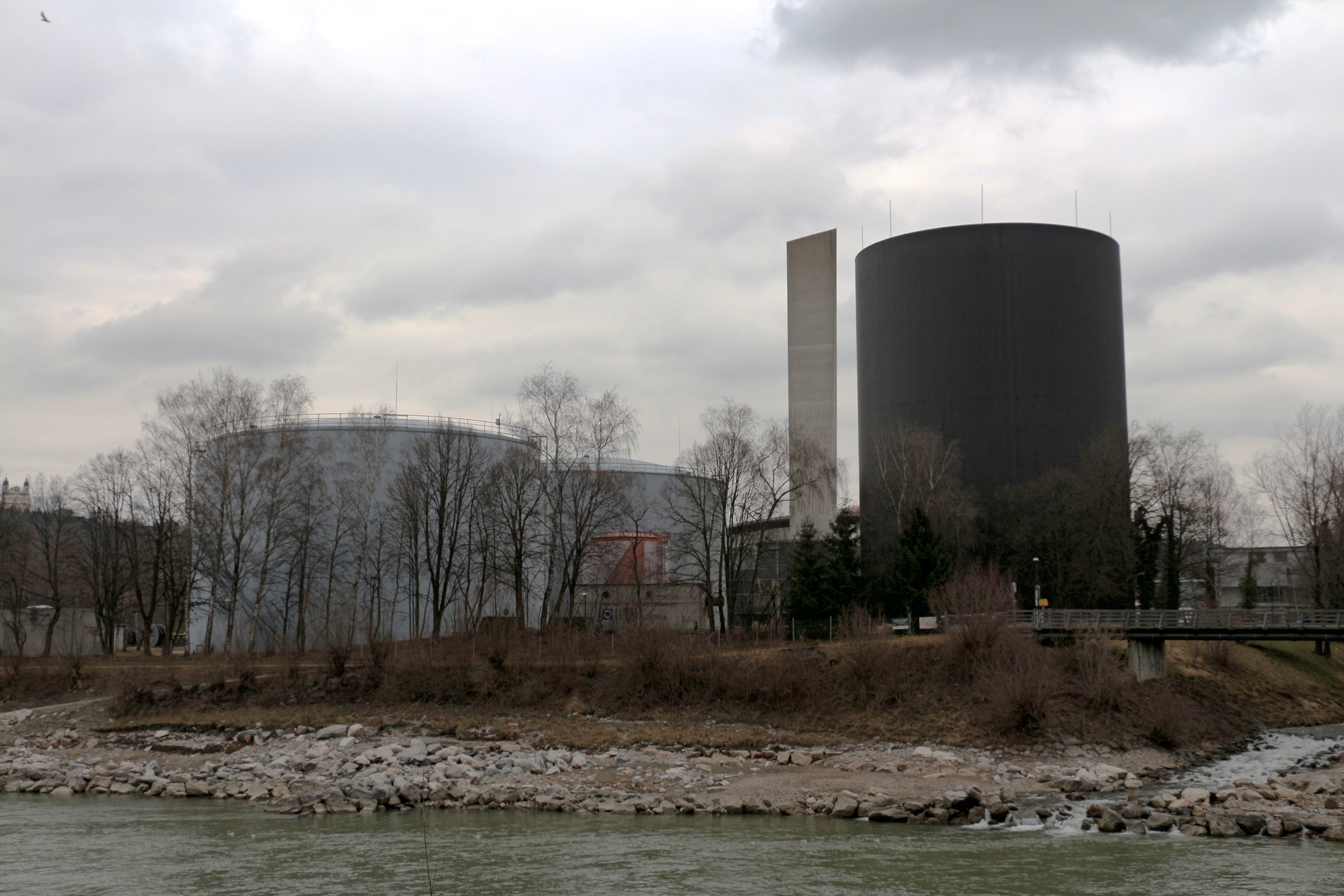 Das Fernheizwerk Salzburg Nord im Stadtteil Itzling; im Vordergrund rechts die Mündung des Alterbachs in die Salzach. Der Weg parallel zur Salzach ist Teil des Tauernradwegs.